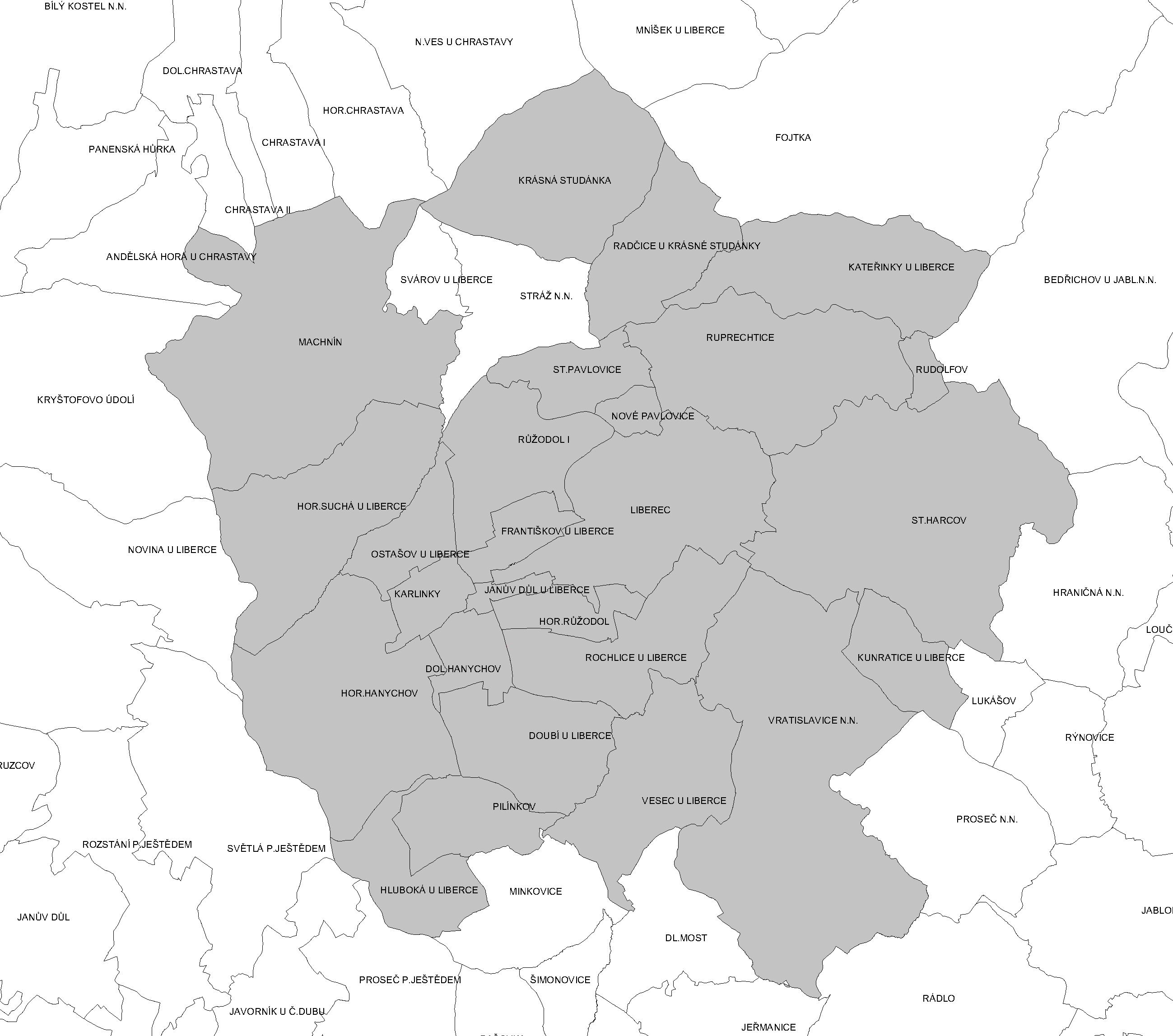 Katastrální členění Liberce